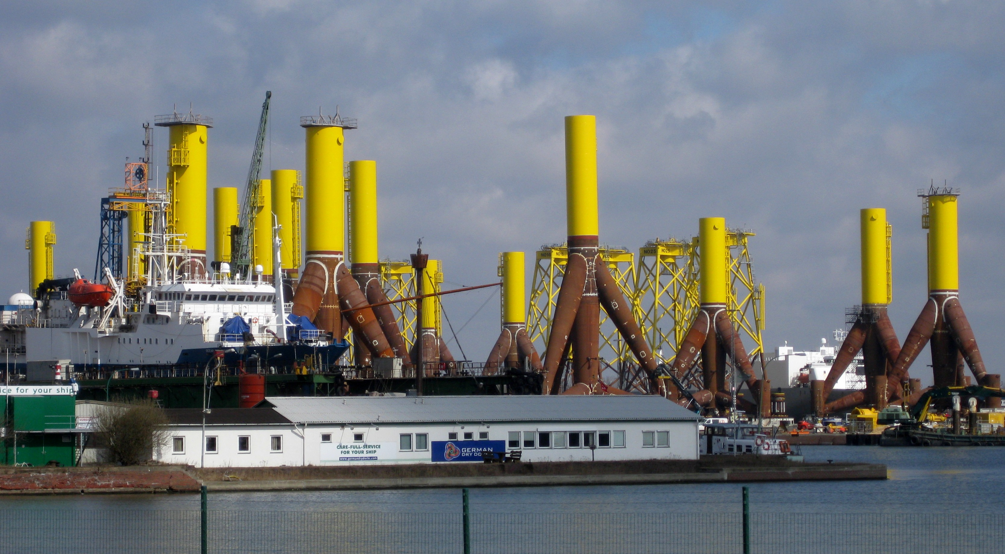 Tripoden für Windkraftanlagen im Hafen von Bremerhaven